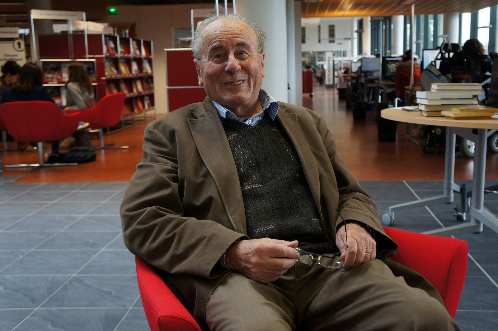 Bartolomé Bennassar au Centre de ressources en langues de l'université Toulouse - Jean Jaurès